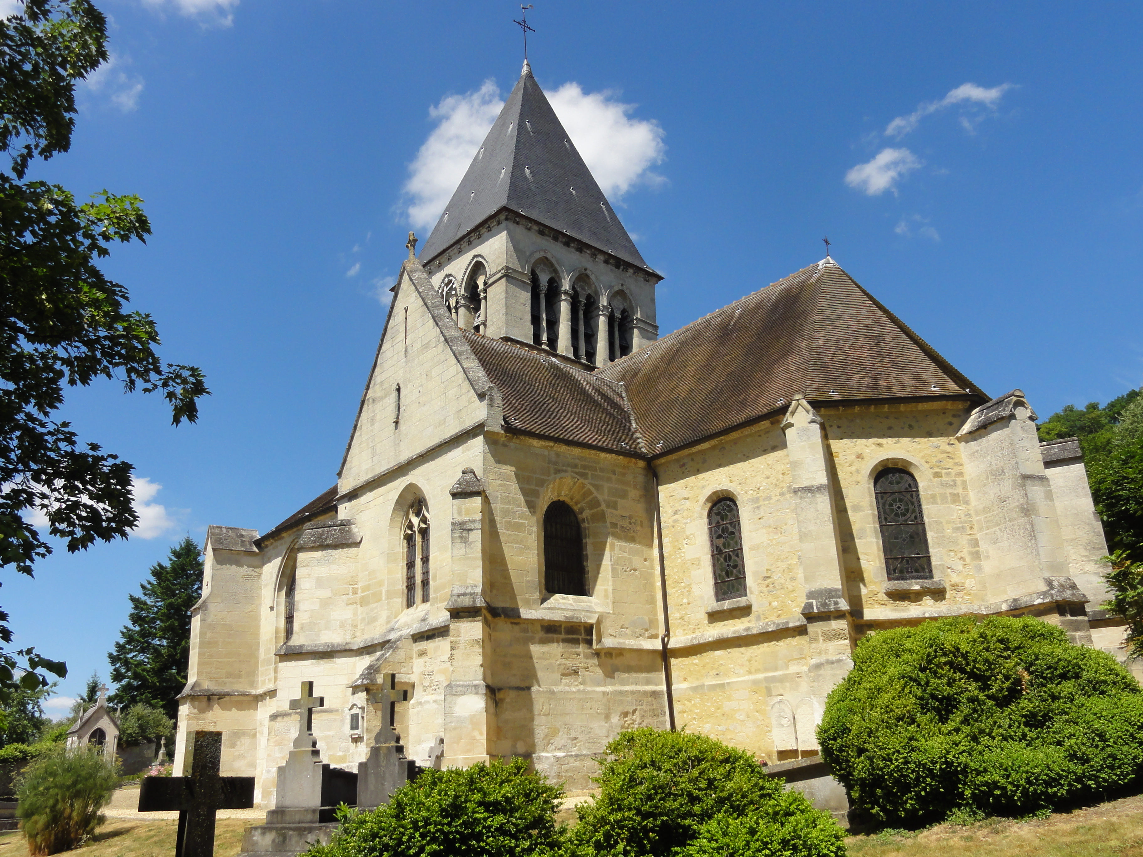 Église Saint-Étienne de Clairoix (voir titre).